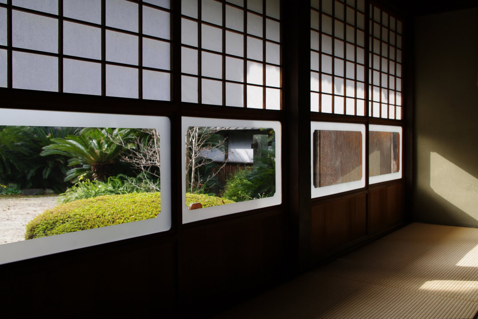 熊本城三の丸跡にある旧細川刑部邸の御客間。2010年12月撮影。